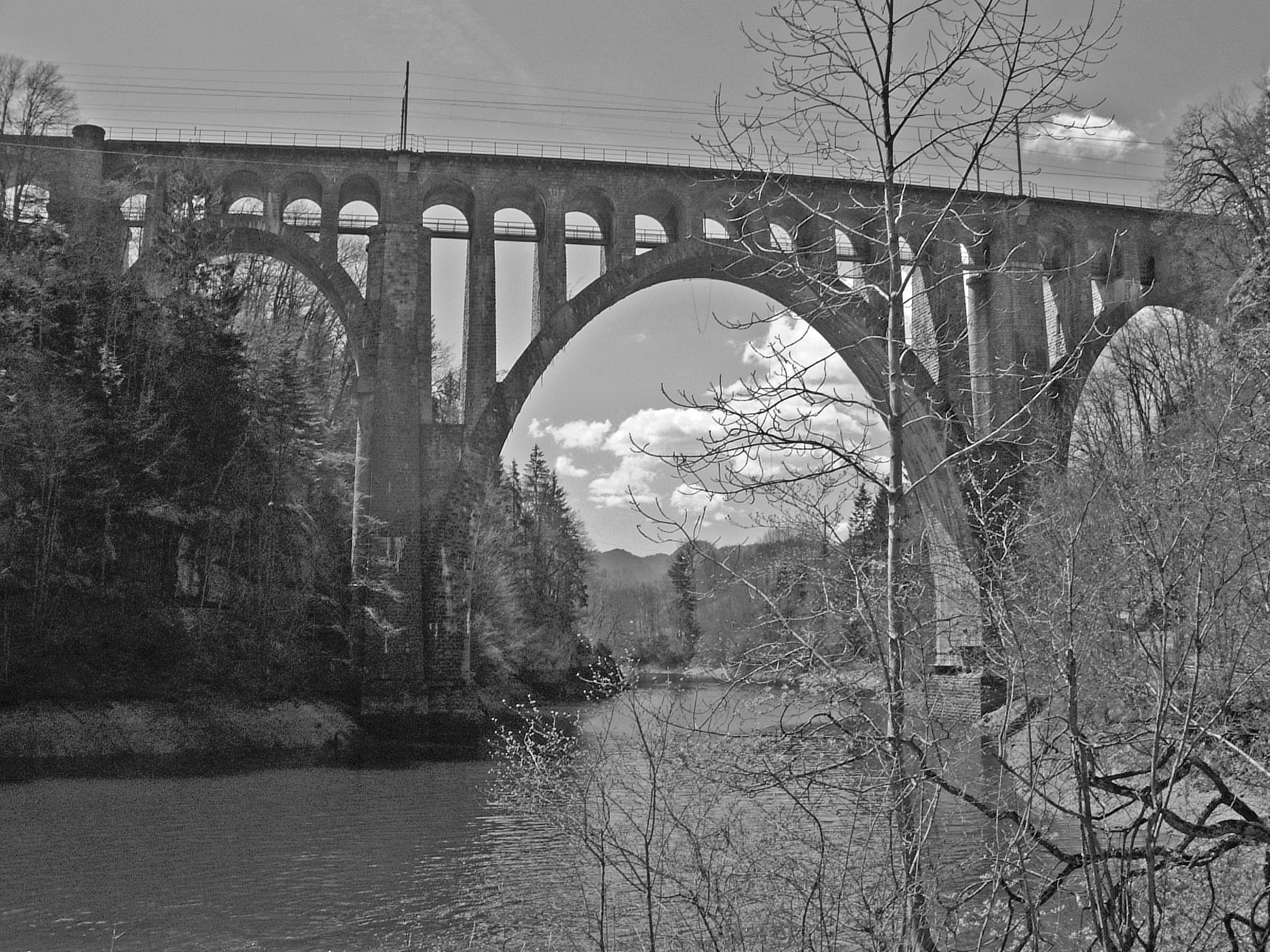 Viaduc permettant le passage du TGV Lausanne - Paris avant la gare de Vallorbe (CH)